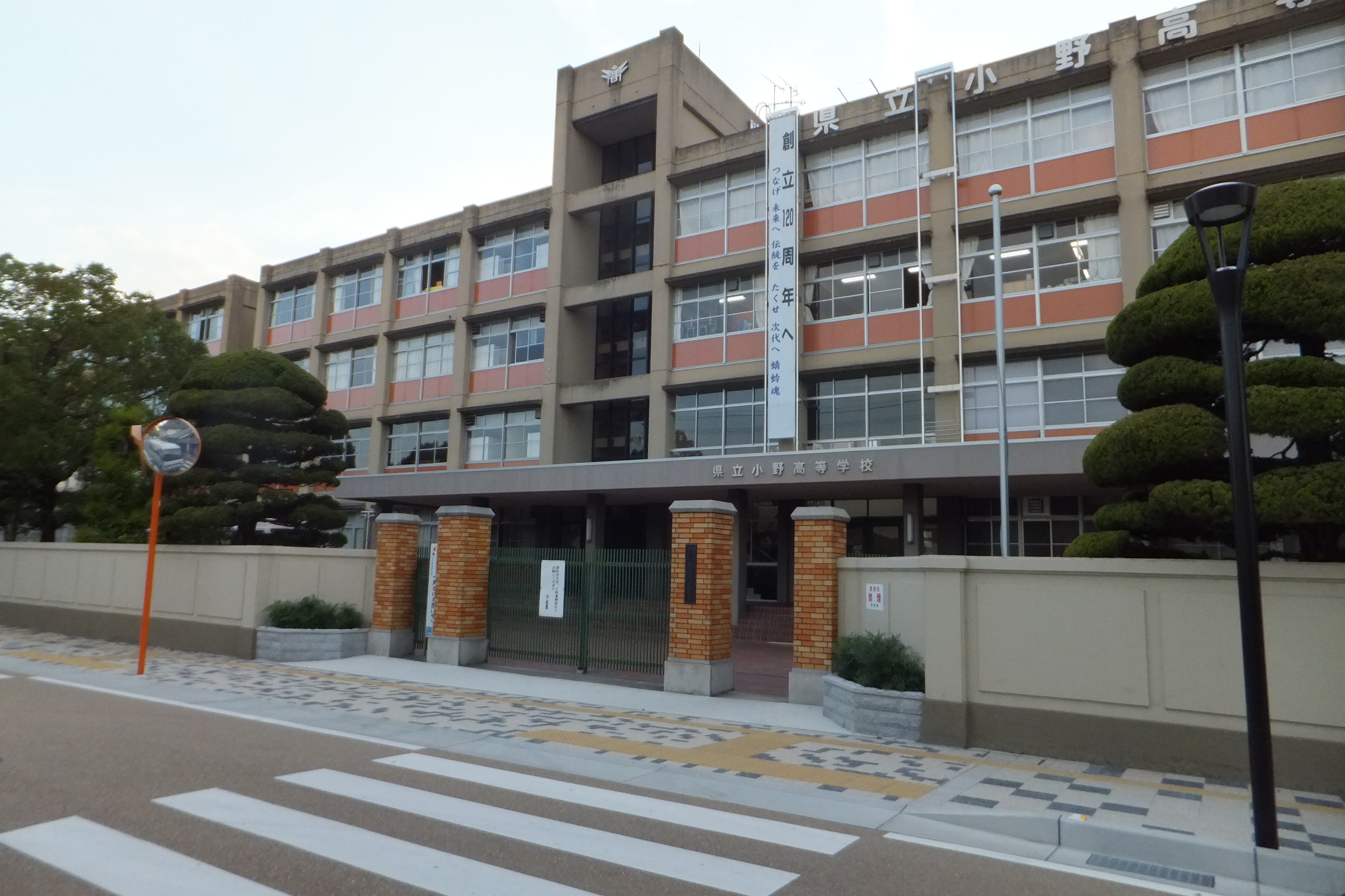 兵庫県立小野高等学校